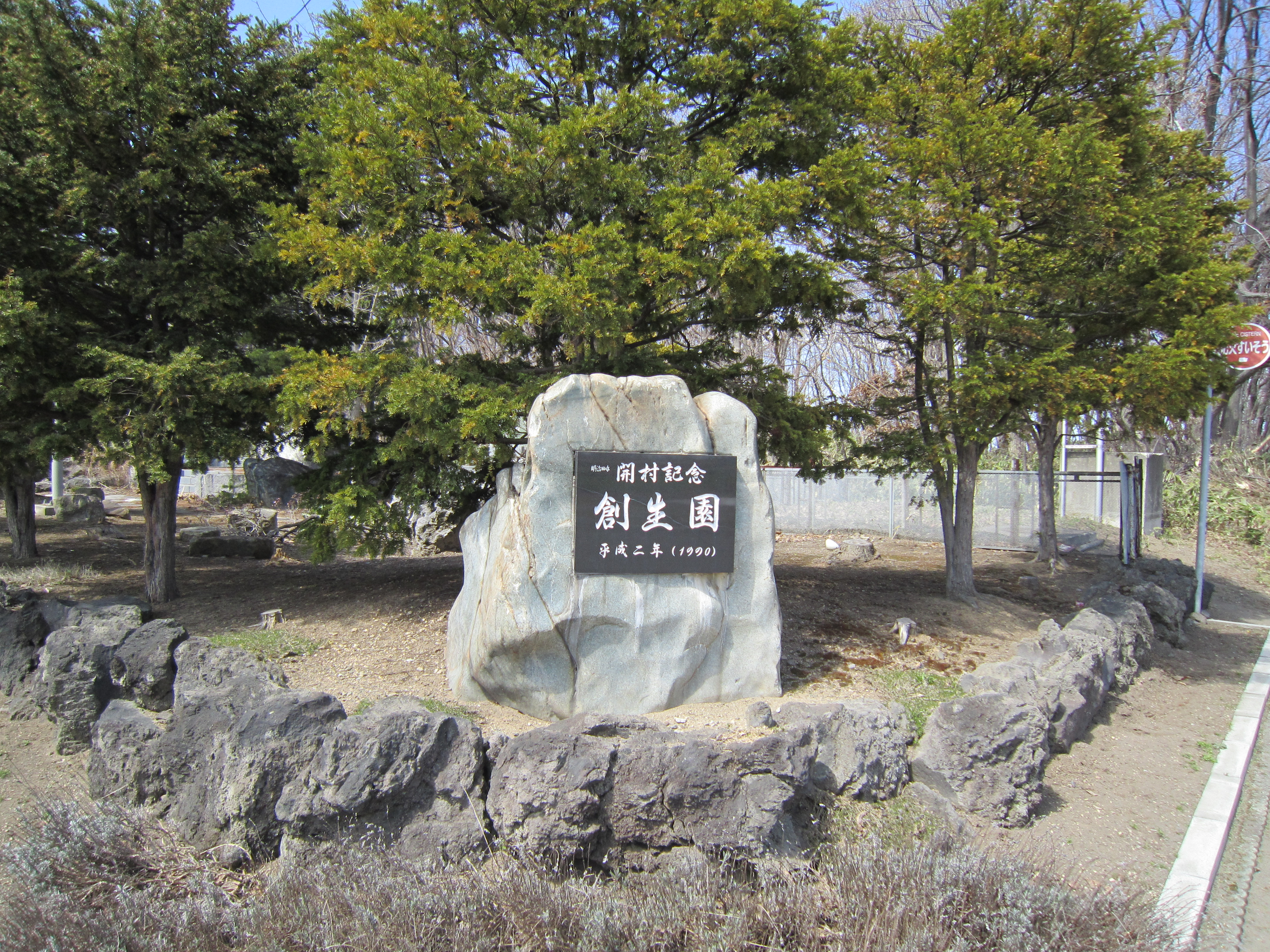 創生園。石狩市生振